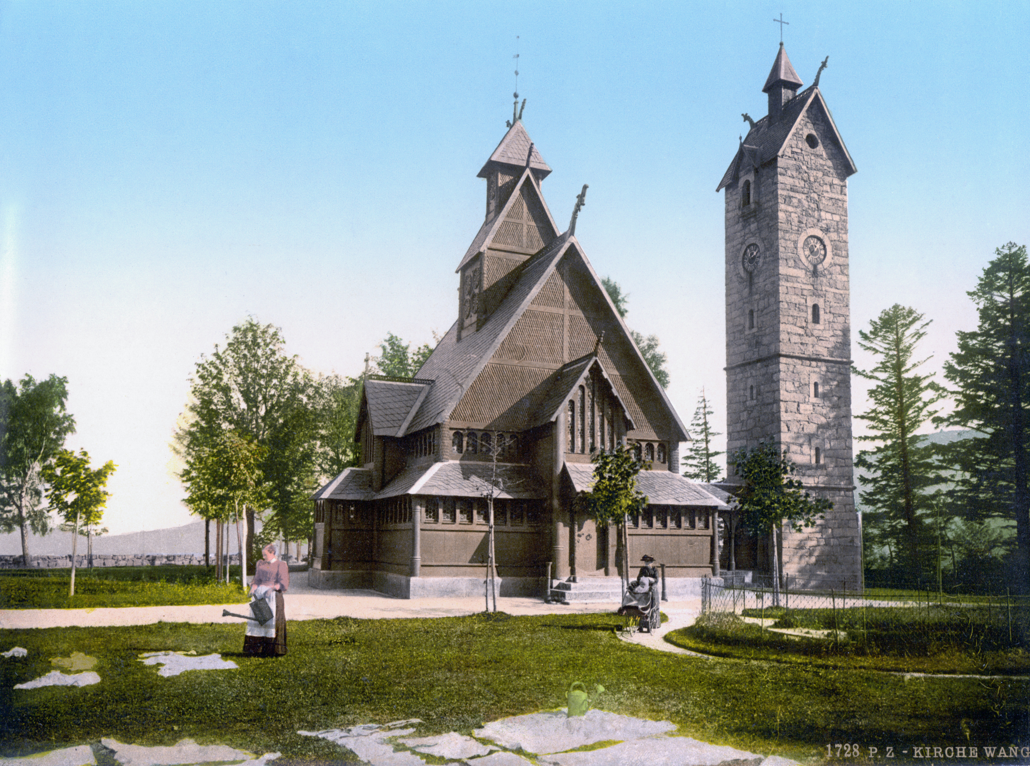 Krummhübel, Kirche Wang